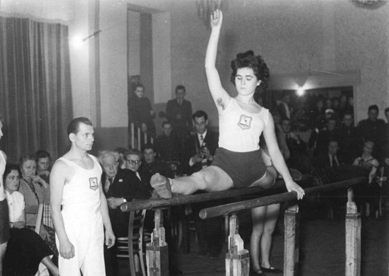 Zentralbild Vogt 18.11.1956 Schülertreffen in Wernsdorf bei Berlin. Die Grundschule Wernsdorf bei Berlin veranstaltet am Sonnabend, dem 17.11.1956 in der HOG "Linde" in Wernsdorf ein Schülertreffen. Die ehemaligen Schülerinnen und Schüler erfreuten zahlreiche Besucher mit Darbietungen des außerschulischen Sportes. UBz: Die Sportlerin Bärbel Raduns bei einer Vorführung am Barren.